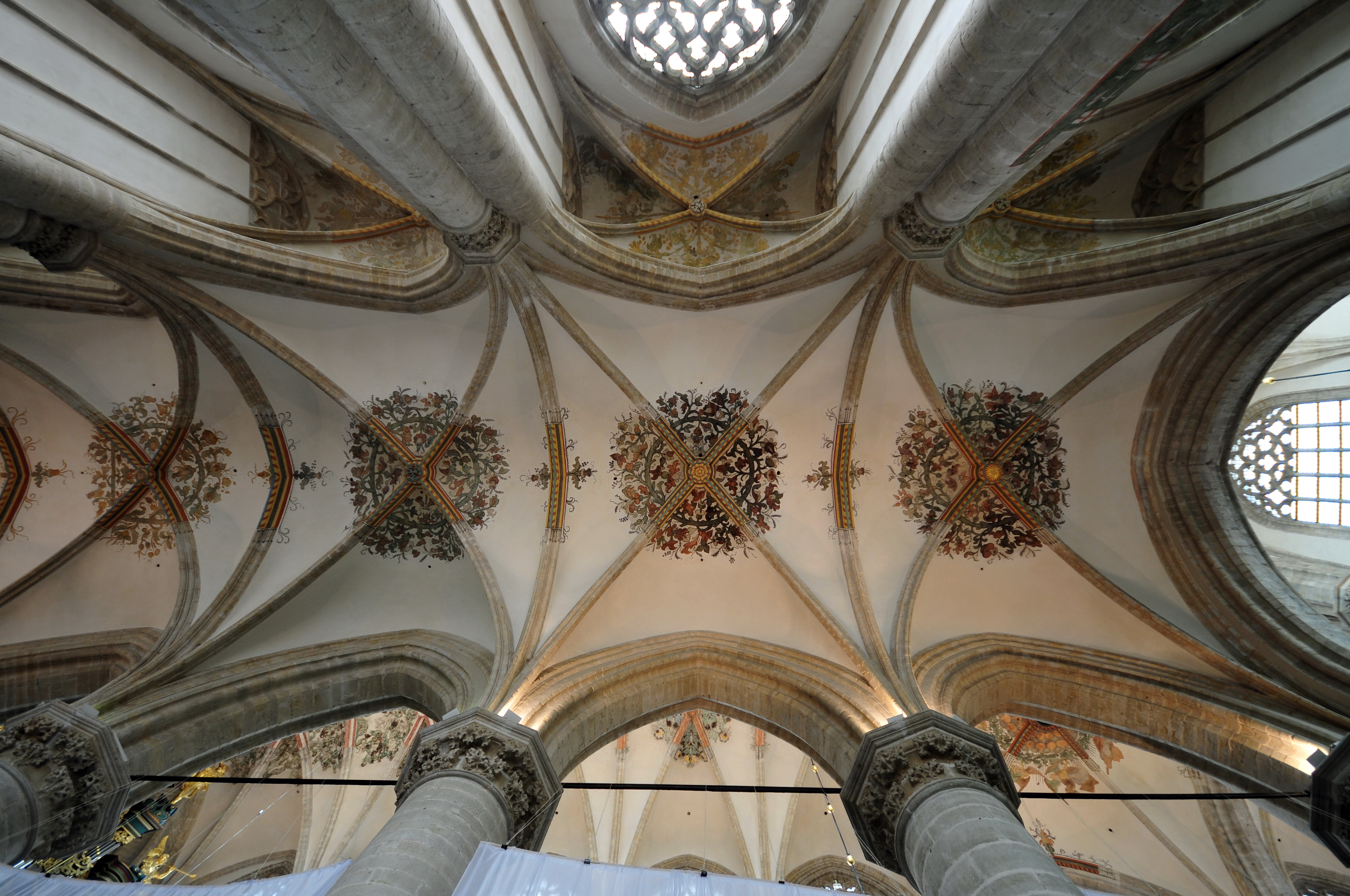 Breda, Niederlande, 2013